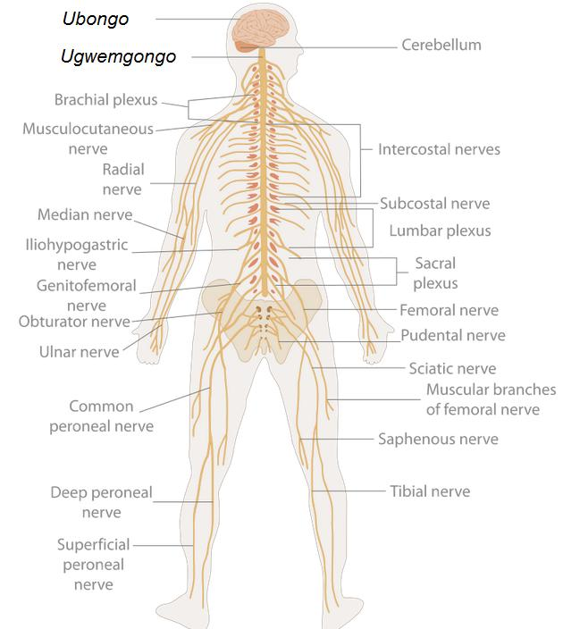 Kiswahili: Mfumo wa neva; sehemu imeswahilishwa kutokana na TE-Nervous system diagram.svg